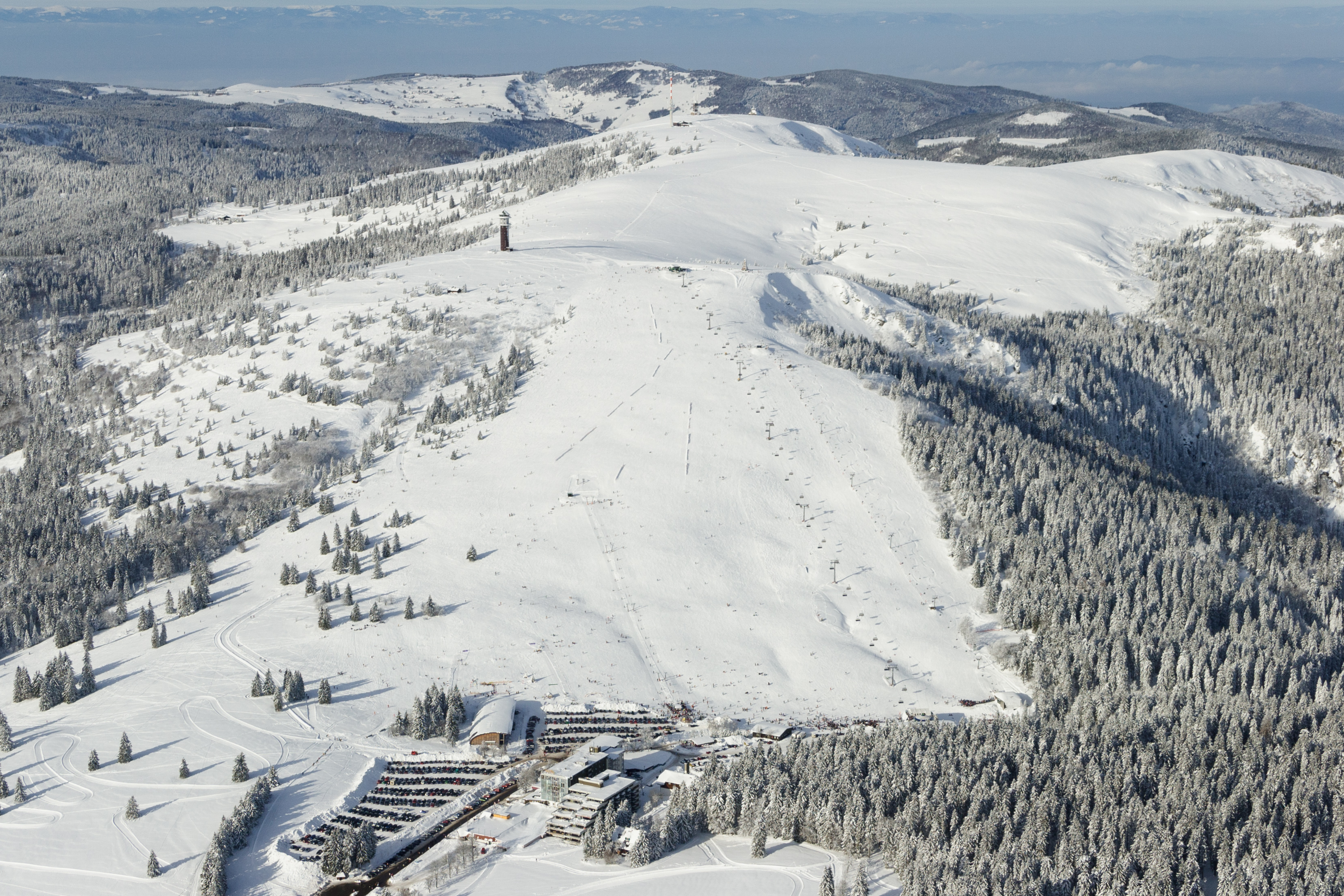 Luftaufnahme Feldberg Seebuck